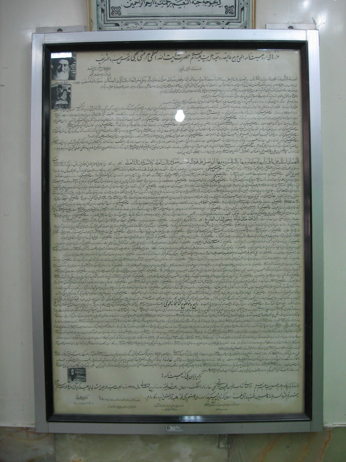 وصیت‌نامهٔ آیت‌الله مرعشی نجفی